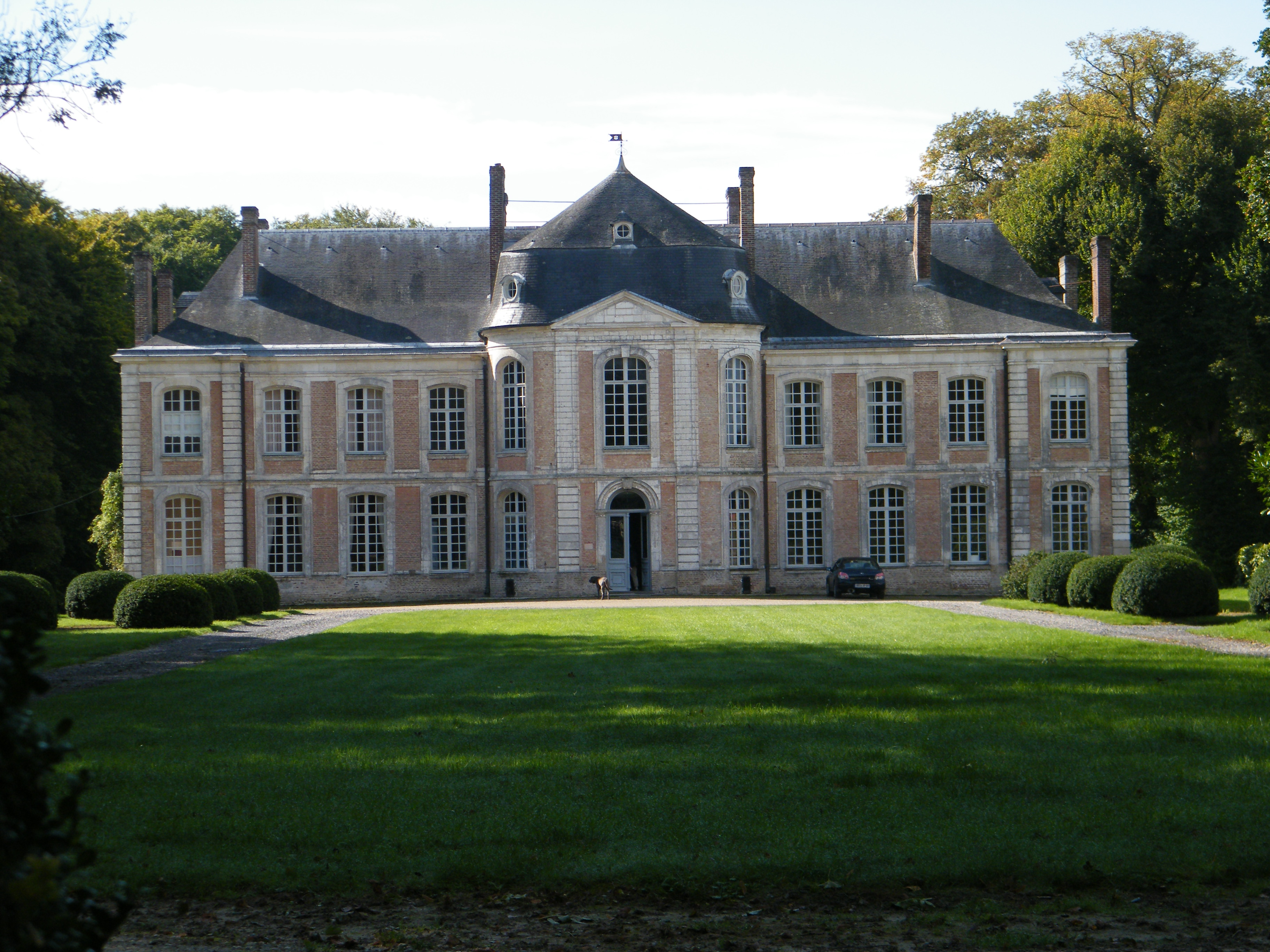 Arry, Somme, Fr, château